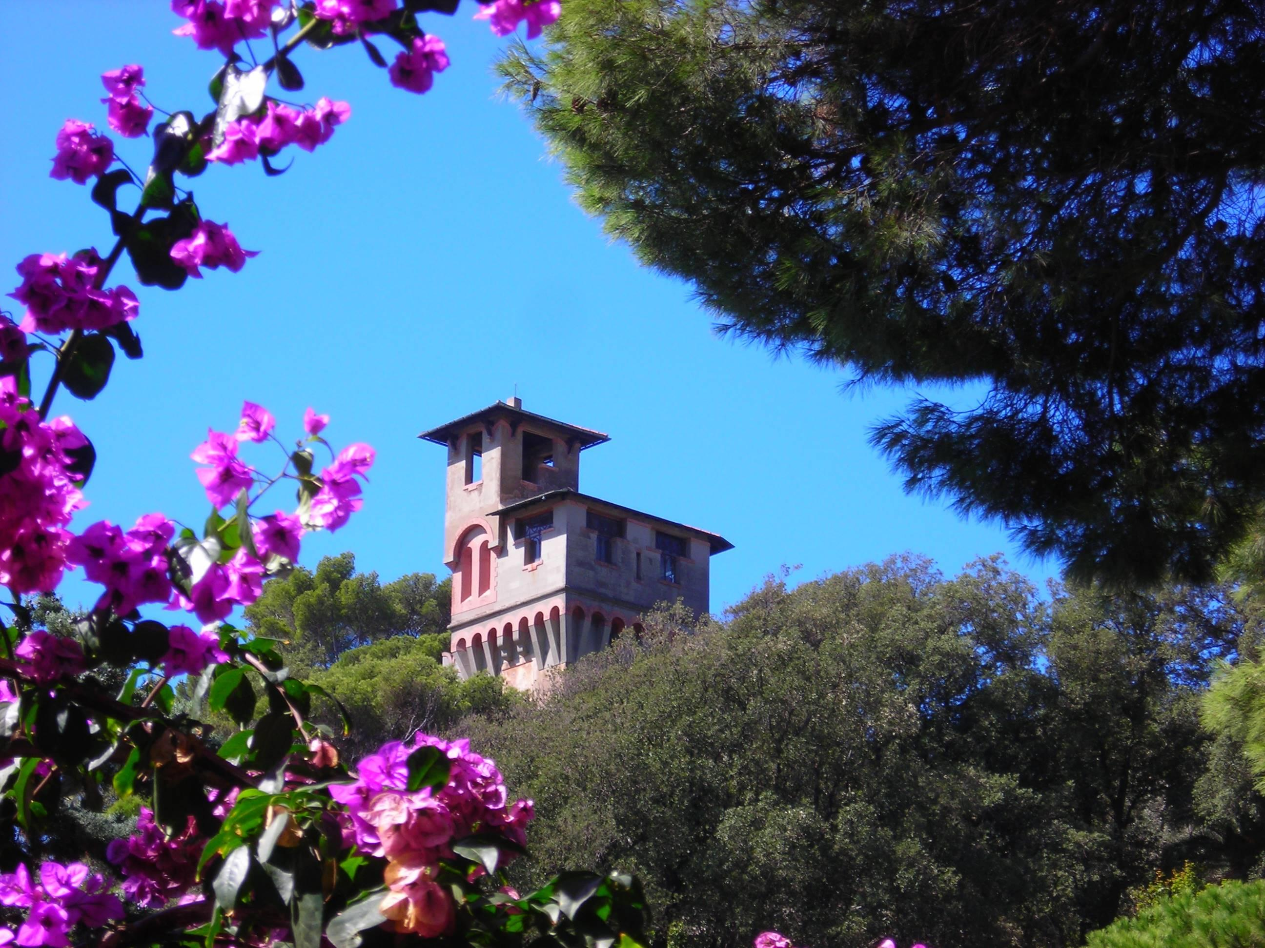 Simone - Castello e fiori Moneglia - GFDL